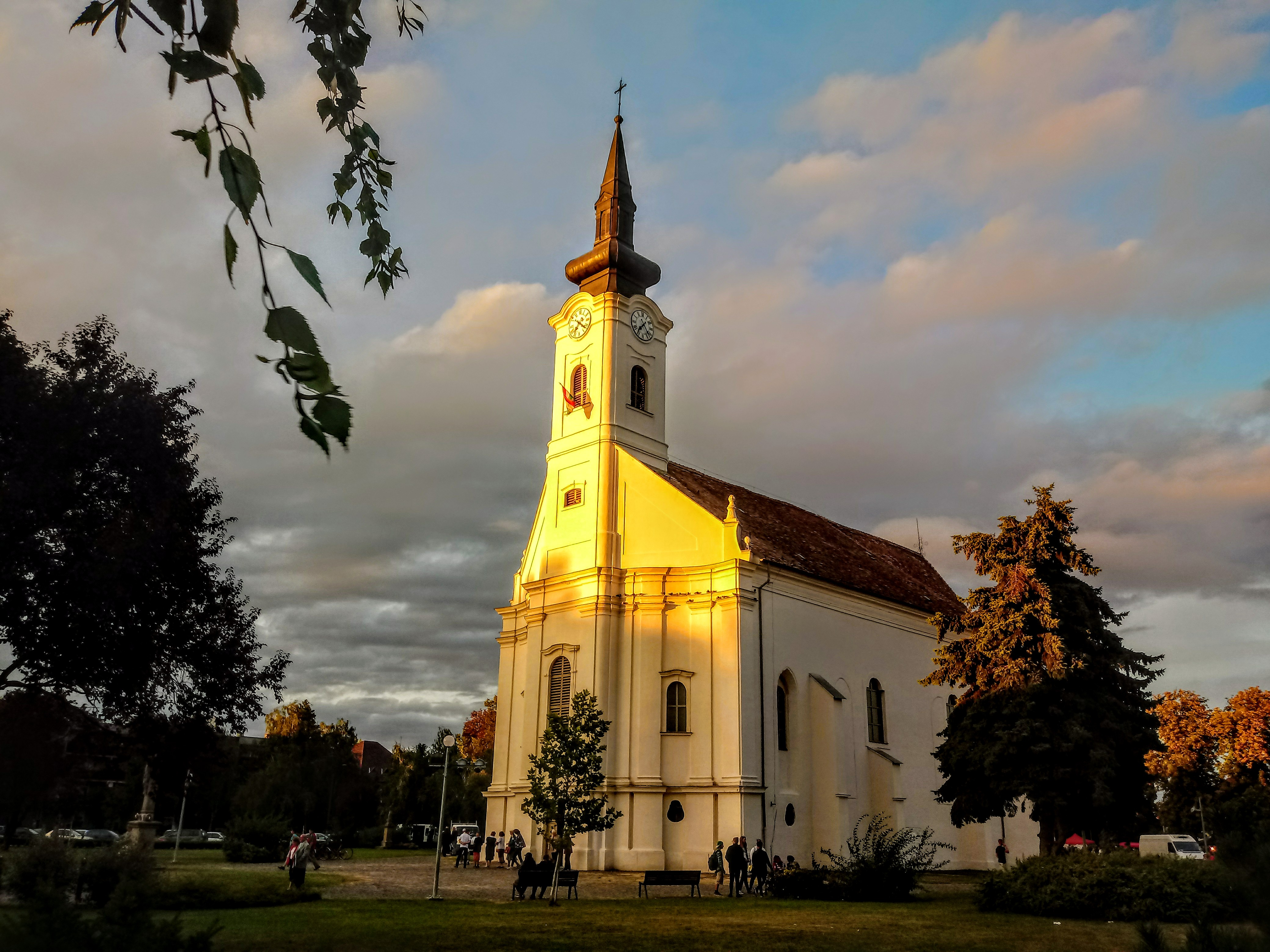 A képen a templom látható.